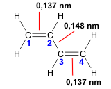 de:1,3-Butadien: BindungslÃ¤ngen Erstellt mit ACD/ChemSketch Ersteller: Benutzer:Thiesi